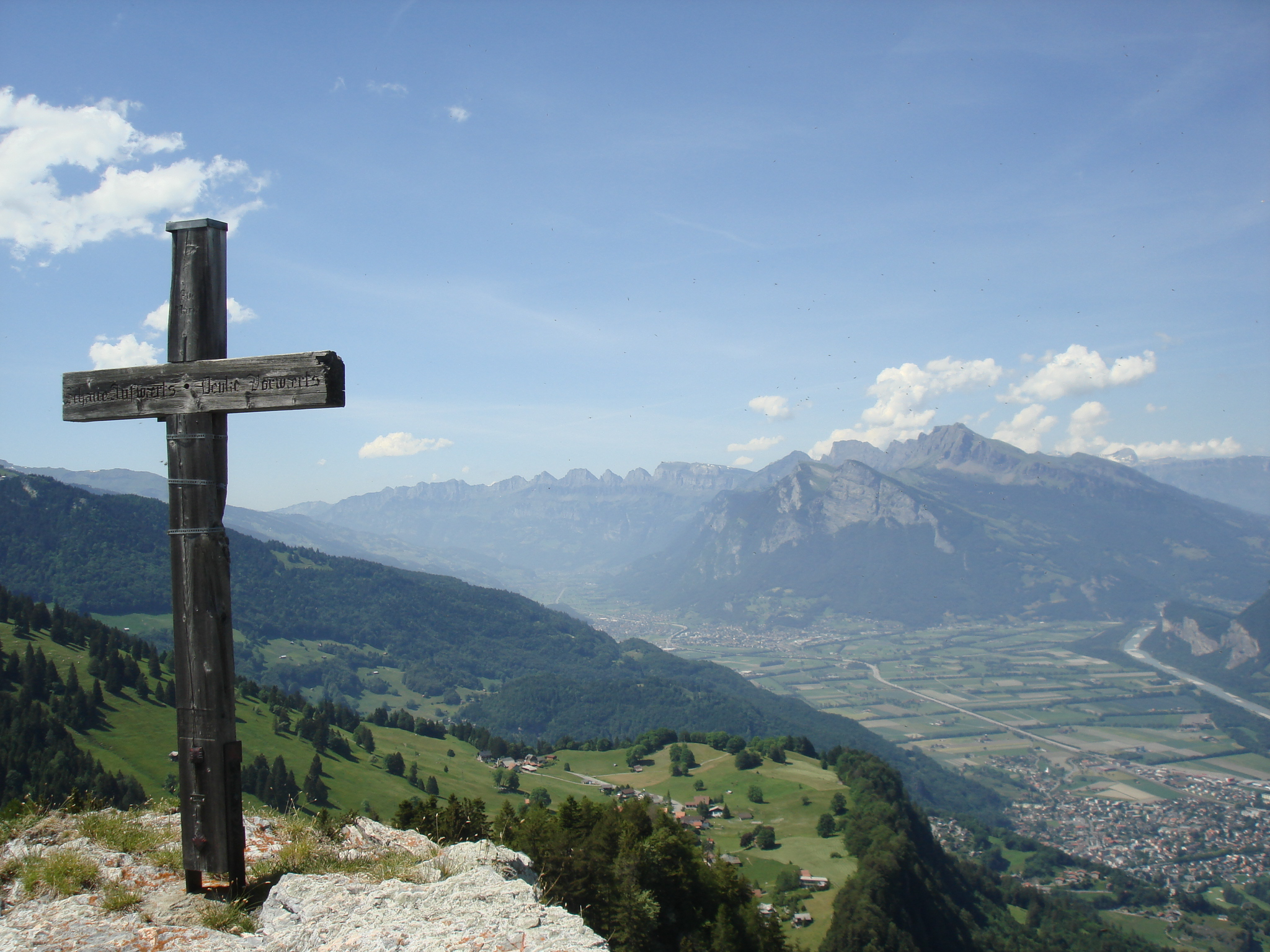 Pizalun